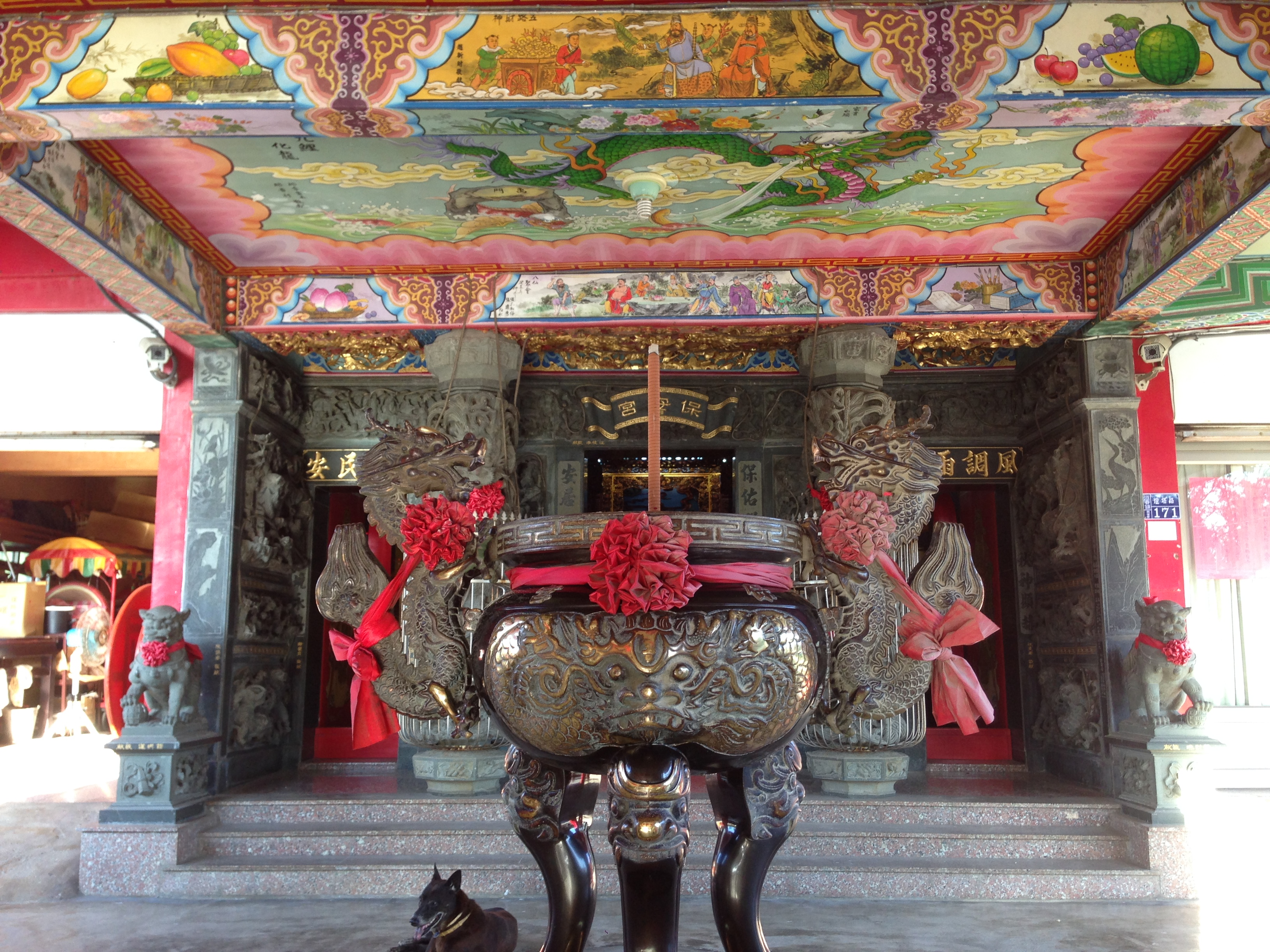 鵝鑾鼻保安宮一景